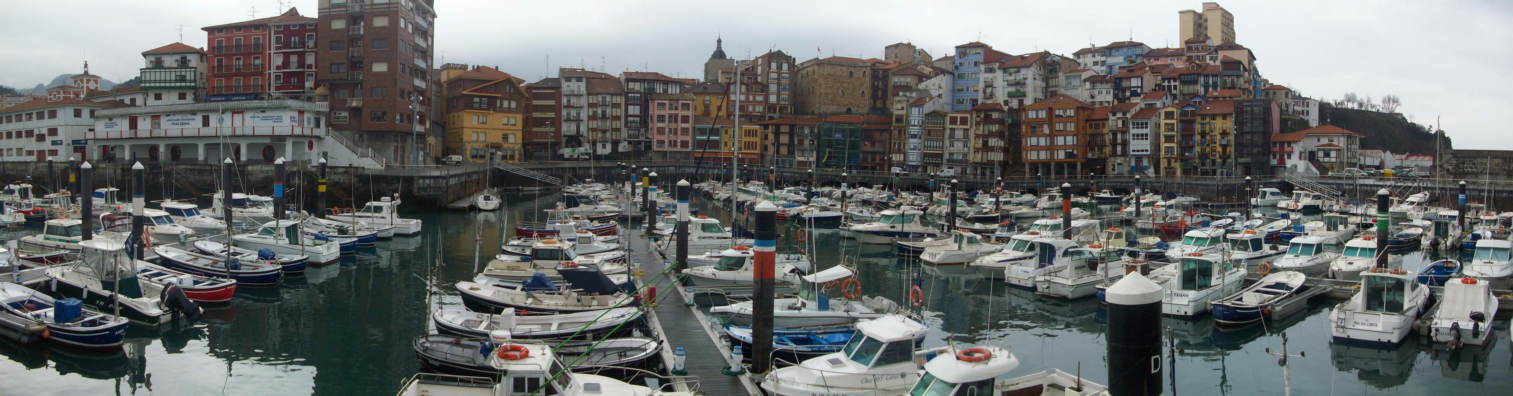 Bermeoko portu zaharra, Bizkaia. Euskal Herria. Old port of Bermeo, Biscay. Basque Country.